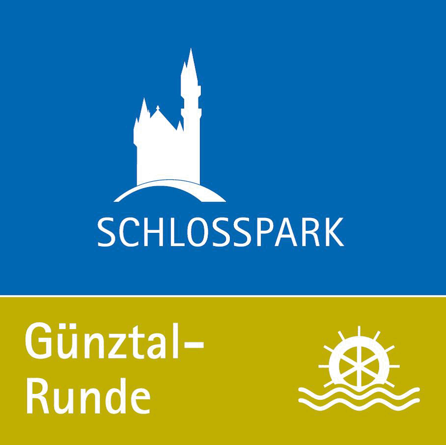 Logo Günztal-Runde